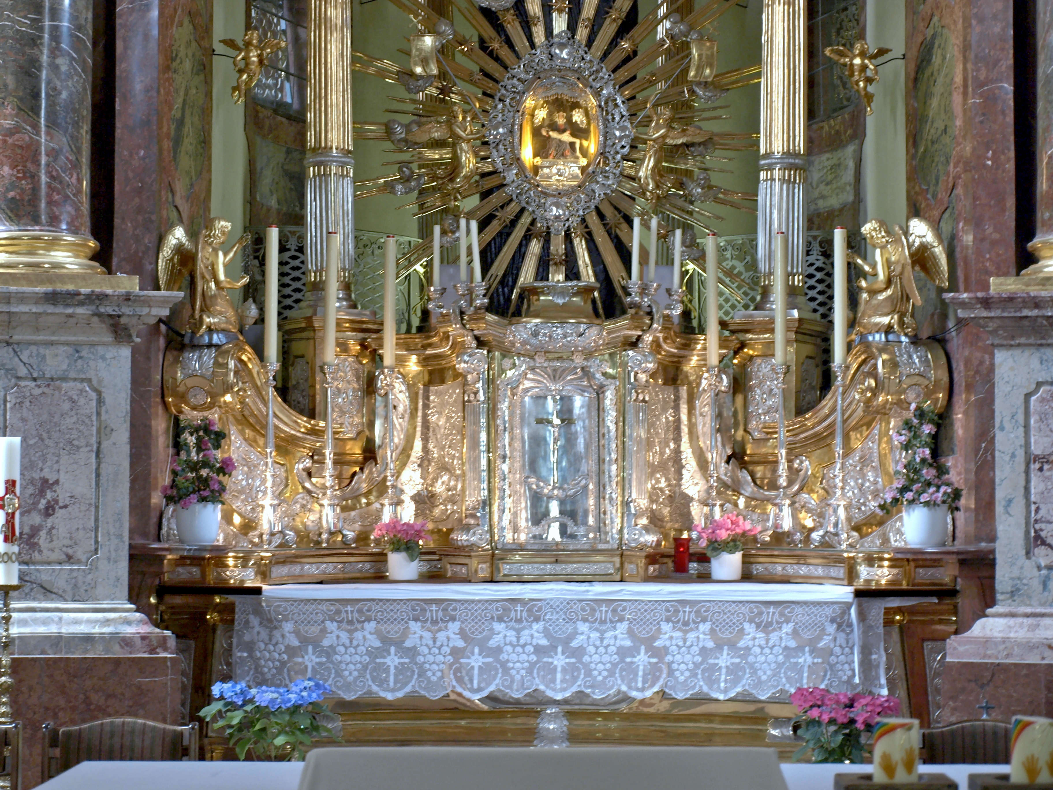 Kath. Pfarr- und Wallfahrtskirche Schmerzhafte Mutter Gottes, Maria Taferl